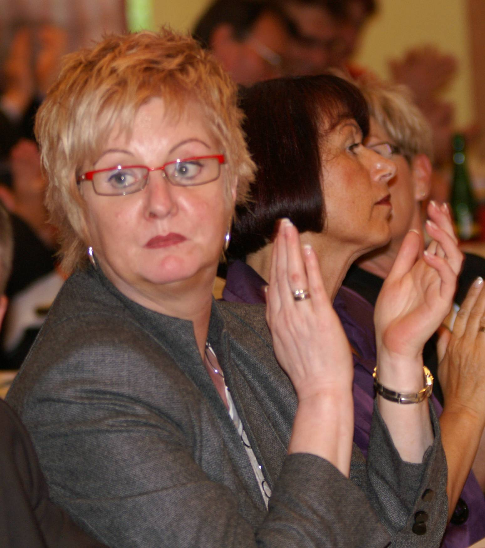 Evelin Groß, 13. Landesausschuss der CDU Thüringen am 16. Juni in Bad Salzungen